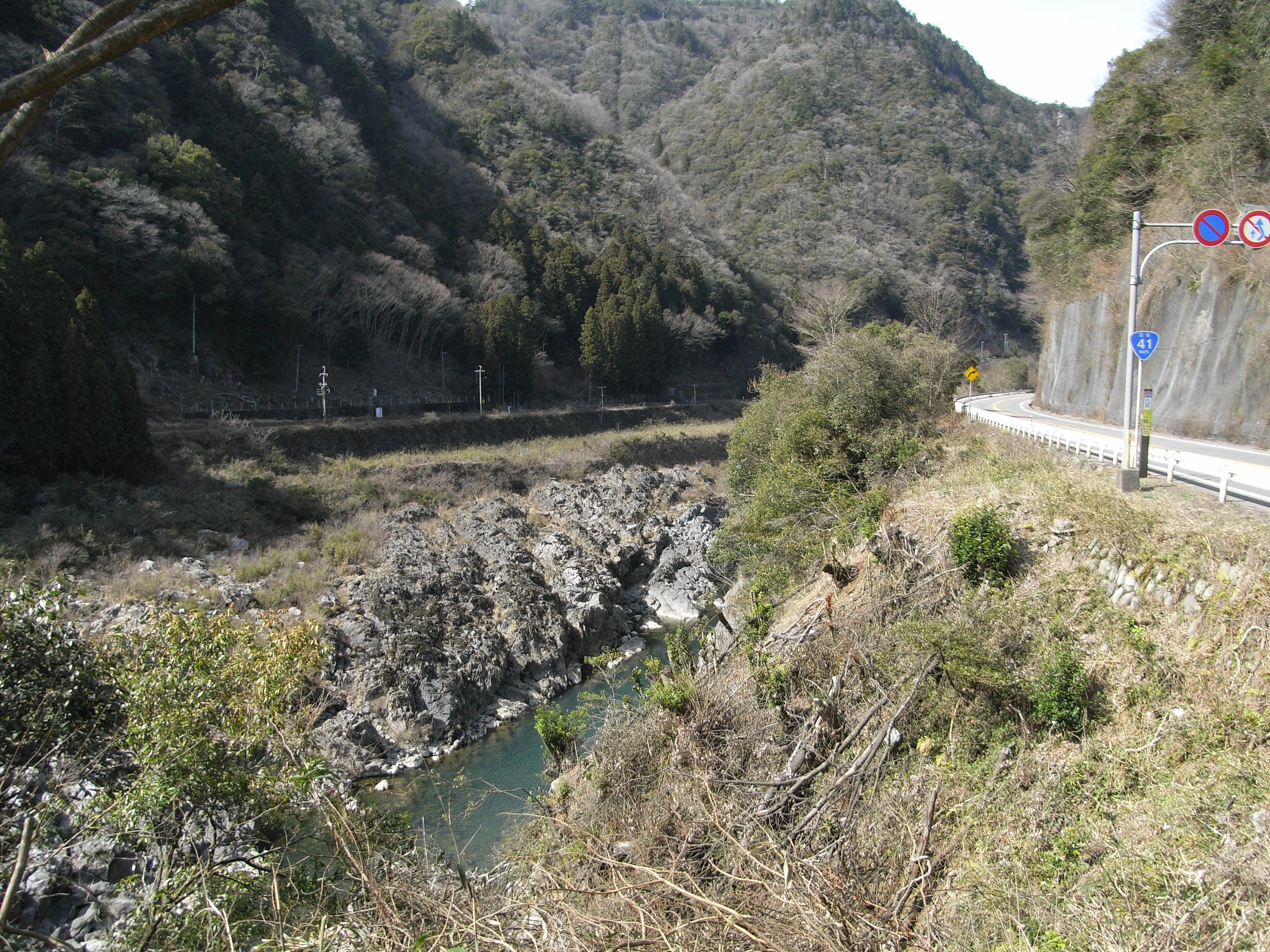 accident